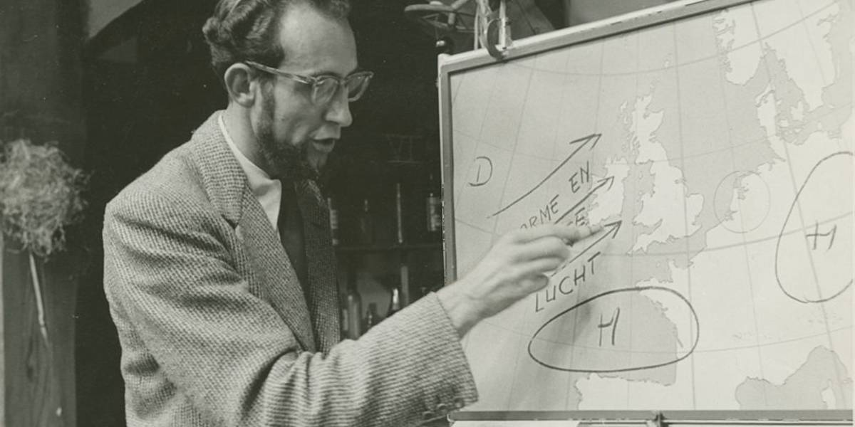 Televisieweerman Joop den Tonkelaar van het KNMI. In het begin van de Nederlandse televisie was er meteen aandacht voor weer. Het eerste weerbericht was op 7 oktober 1951. Televisieweerman Joop den Tonkelaar van het KNMI verzorgde 800 weerpraatjes. Sinds 1996 presenteert KNMI geen weerberichten meer. Bron: Nederlands Instituut voor Beeld en Geluid